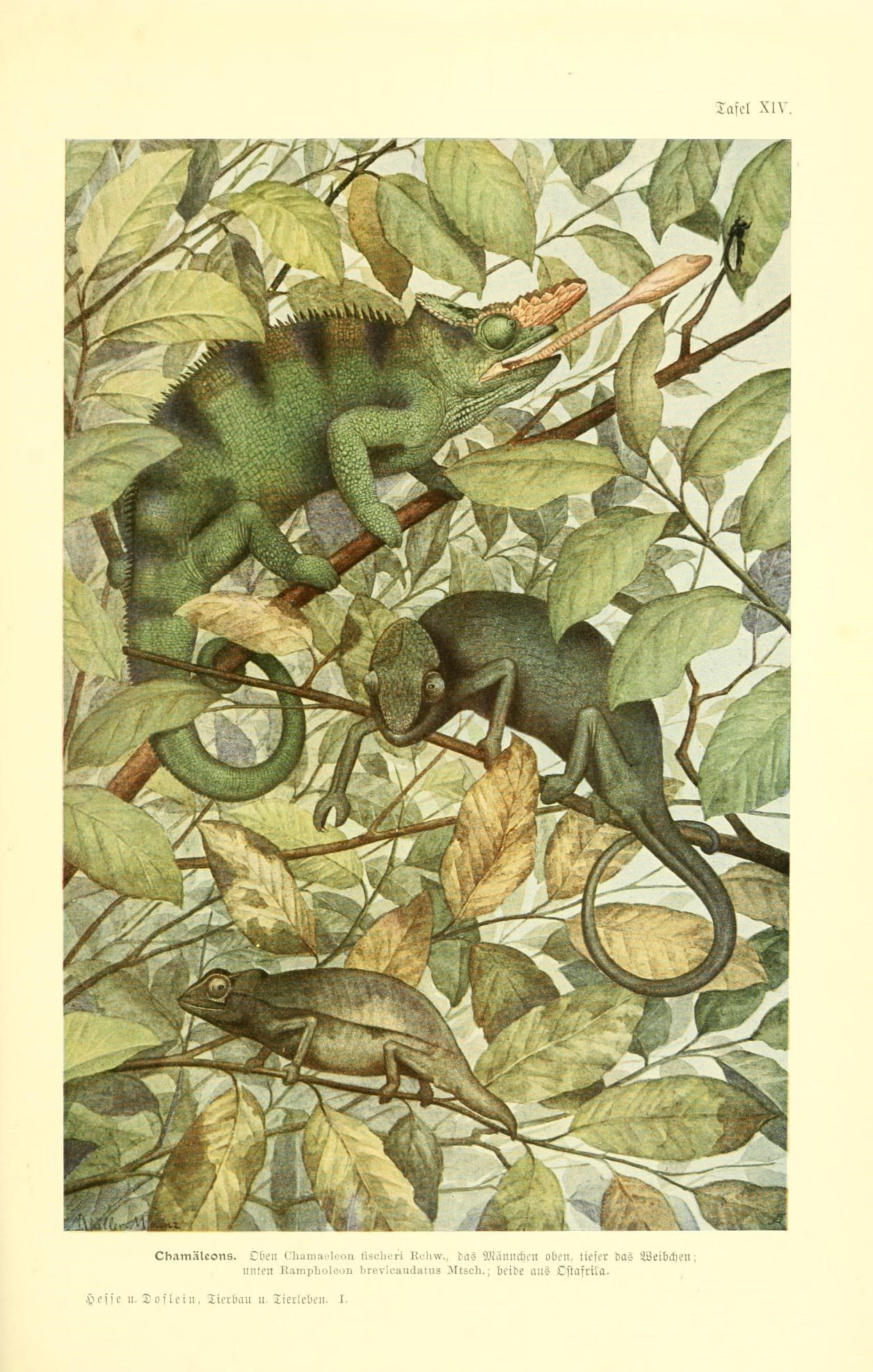 Tafel XIV. Chamäleons. Oben Chamaeleon fischeri Rchw., das Männchen oben, tiejcr Das Söei&cfieii; unten Rampholeon brevicaudatus Mtsch. ; beide aus Ostafrika. Jpefi'e II. Sofiein, Sicrtuut u. iierleßeii. I